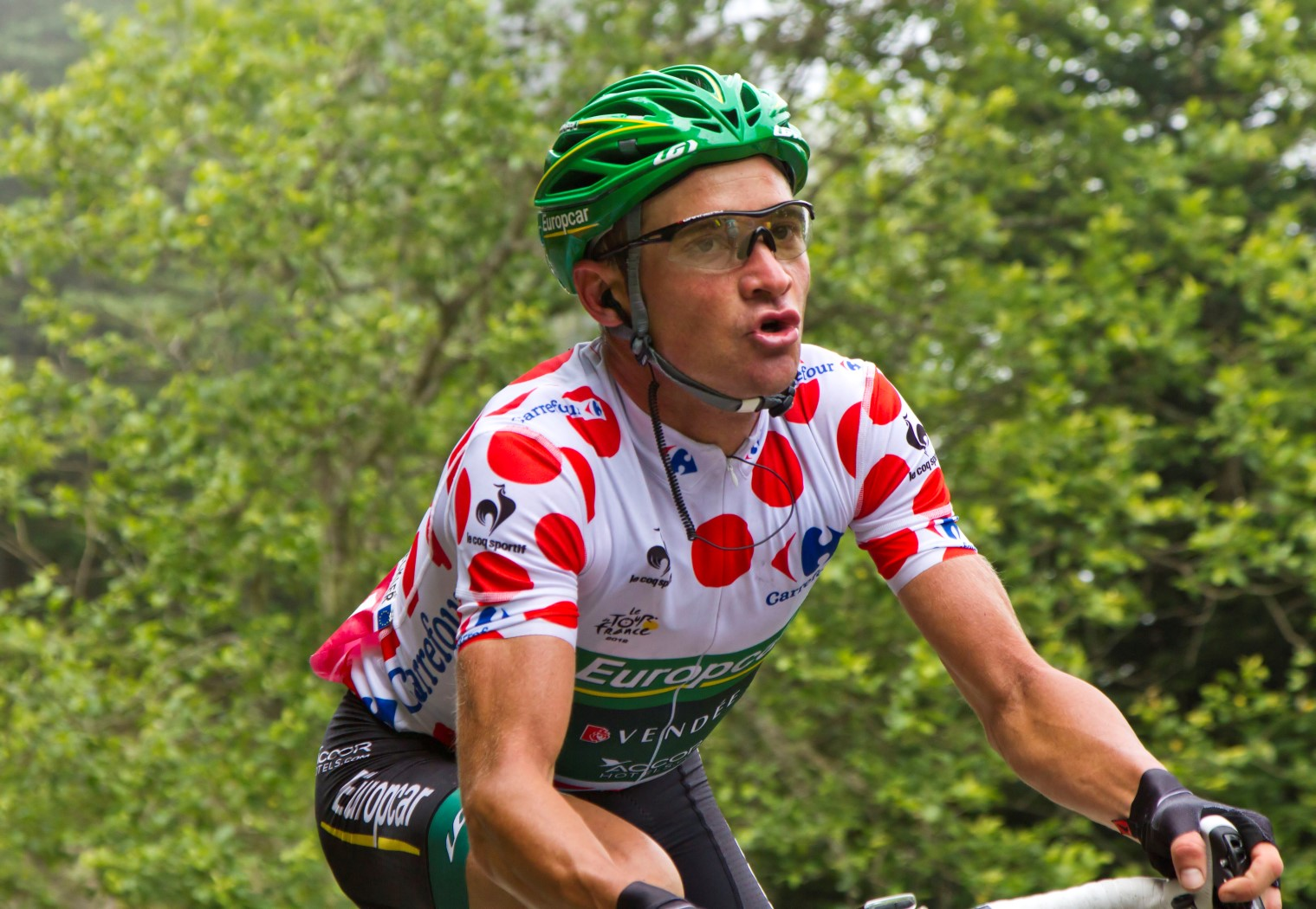 029 voeckler